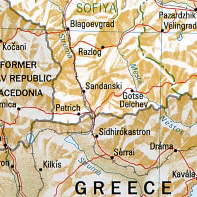 Sandanski - Lage des Ortes in Bulgarien